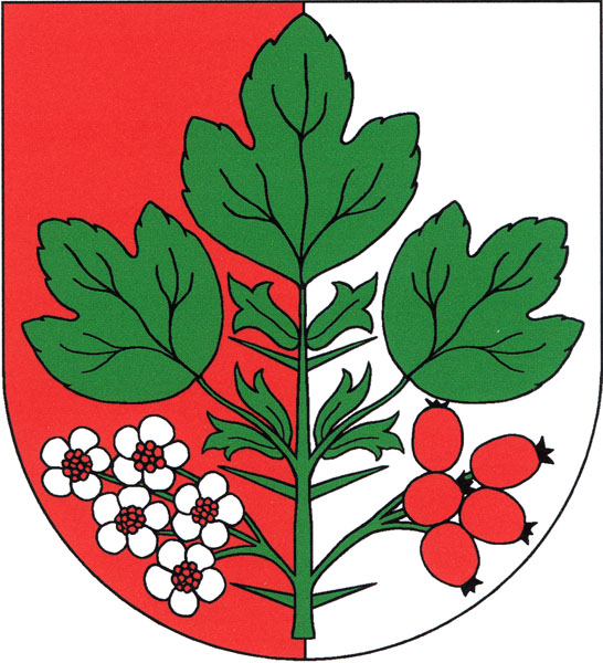 Znak obce Hlohovčice